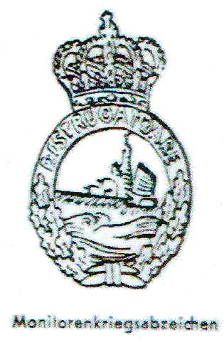 Grafische Darstellung des Monitoren Kriegsabzeichen (Rumänien)